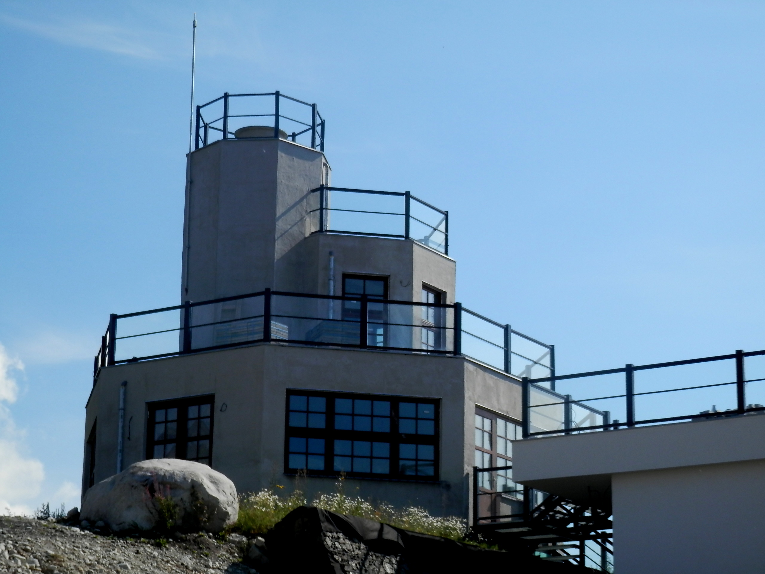 Vysokohorská osada s názvom Štrbské Pleso. Leží v nadmorskej výške asi 1 350 metrov. Obec Štrba, okres Poprad. Leto 2016